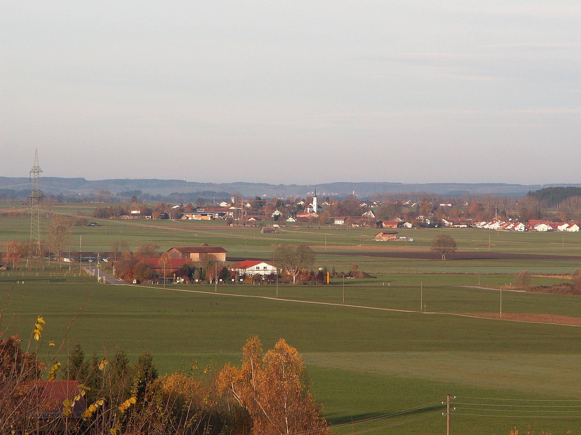 Westendorf (Allgäu) von Südosten